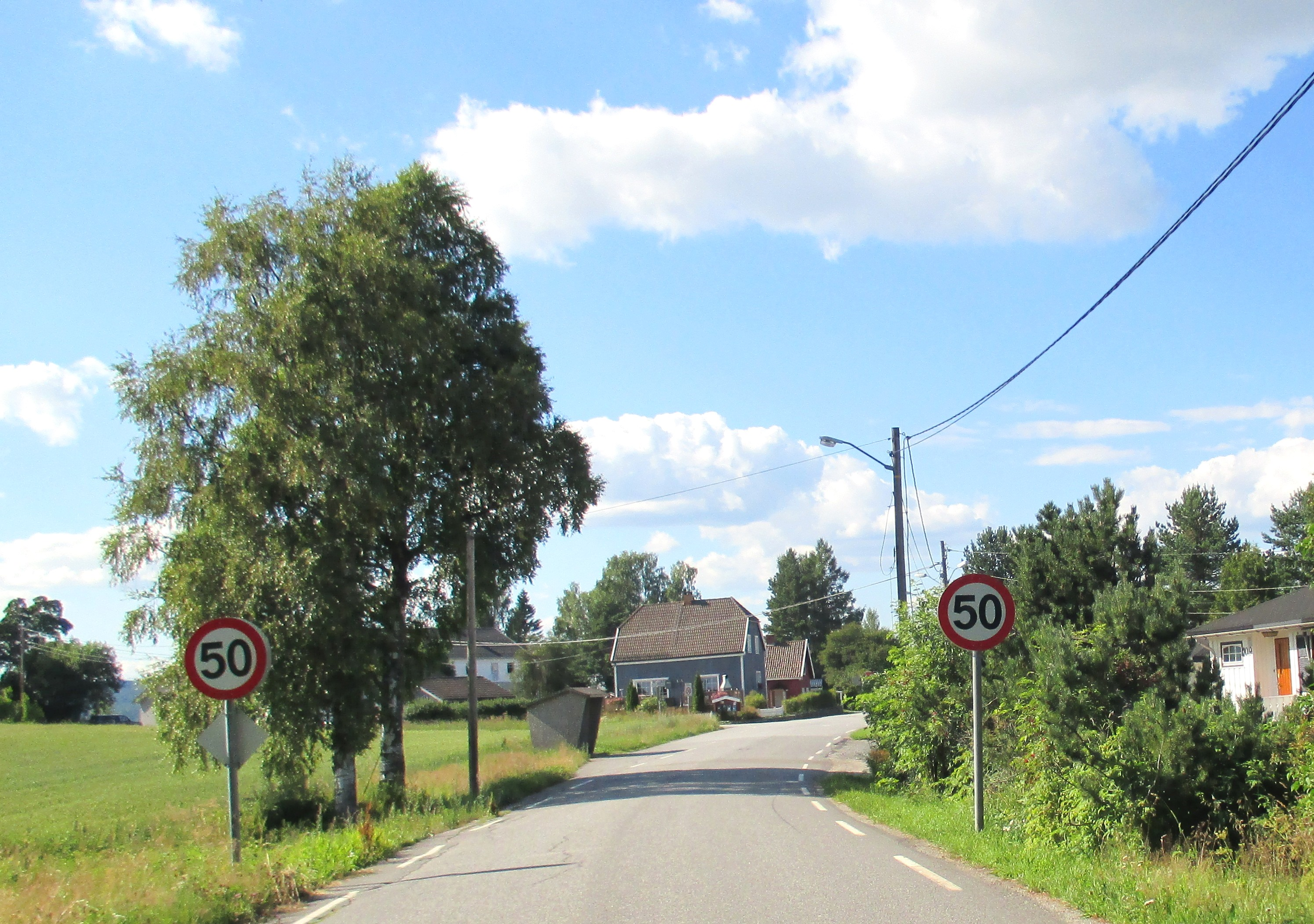 Holtervegen (FV527) sør for FV178